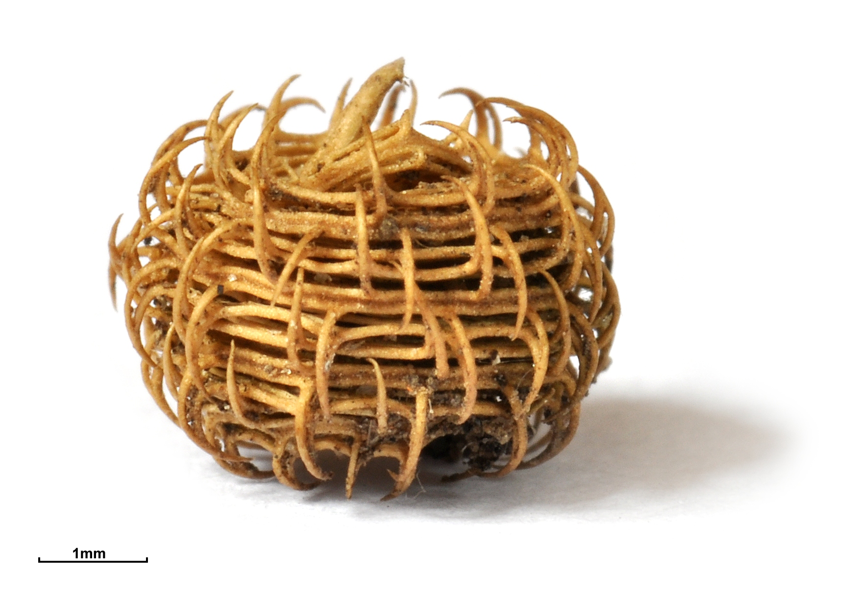 Reife Fruchthülse von Medicago arabica, ca. 4,5mm Durchmesser